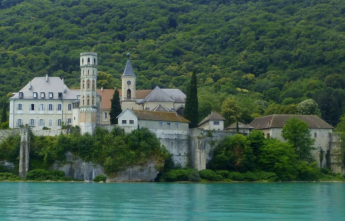 L'abbaye de Hautecombe sur les rives sauvages du plus grand lac d'origine naturel en eau douce de France, le lac du Bourget (Savoie).